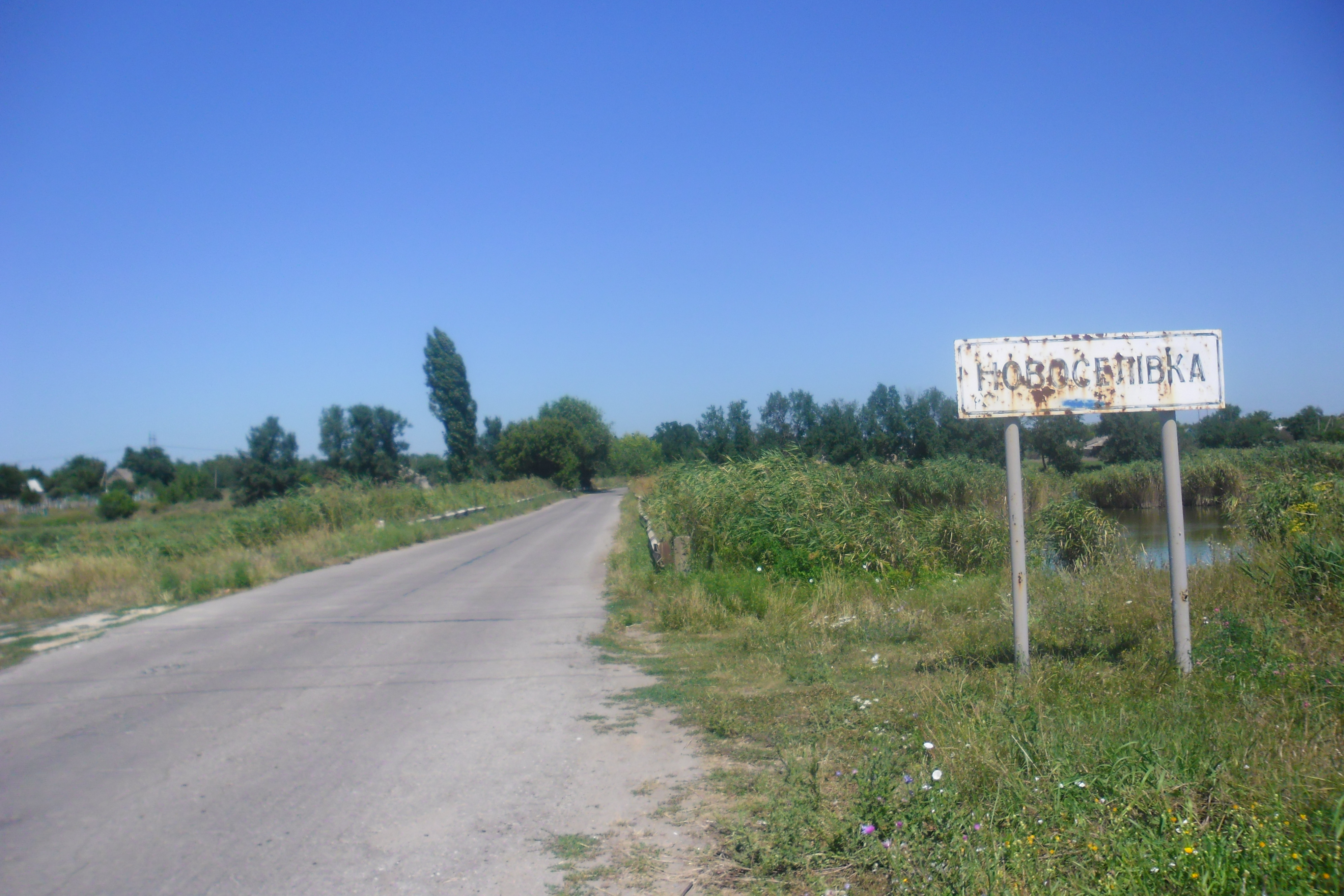 Новоселівка (Вільнянський район)